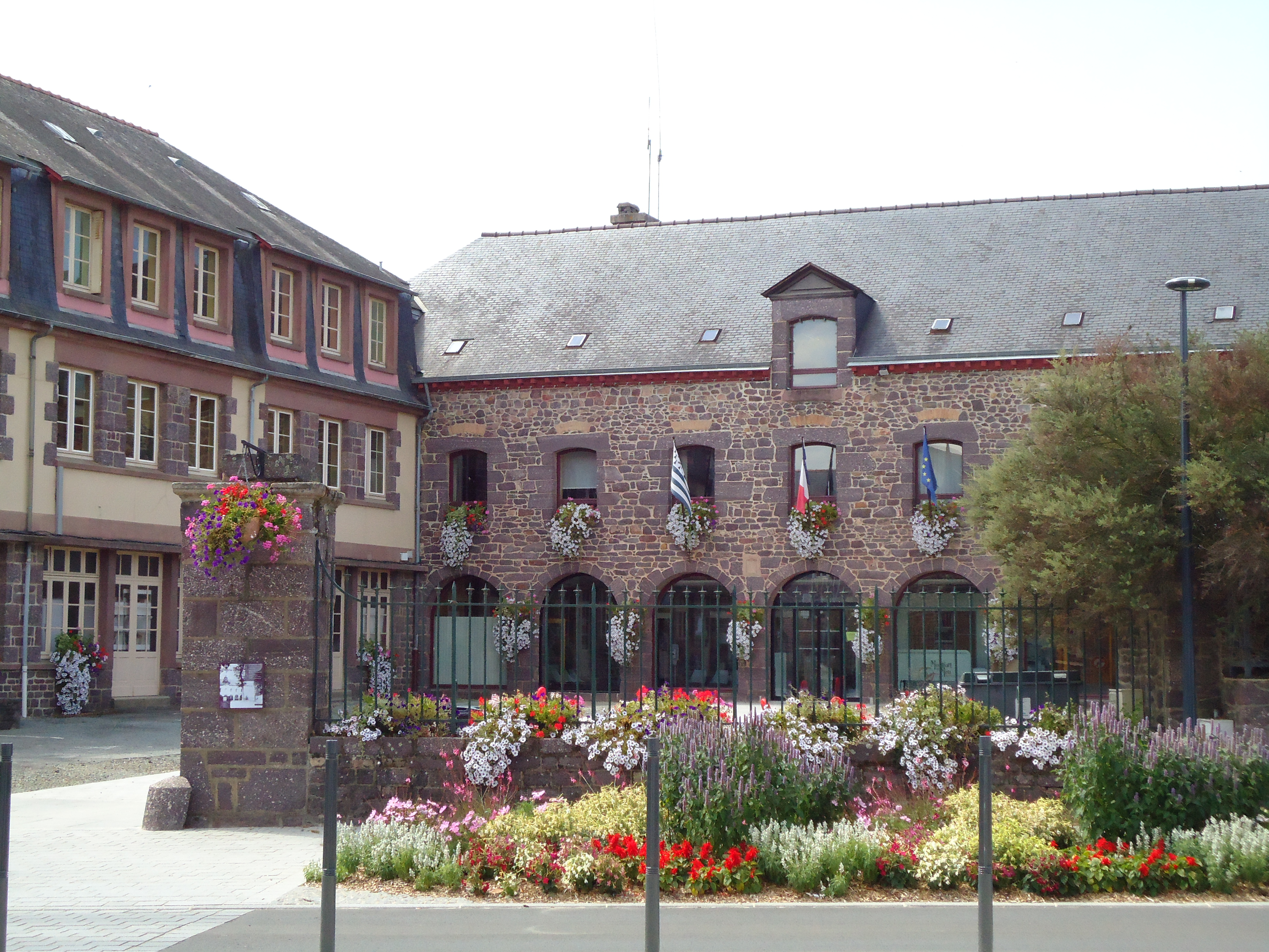 Mairie